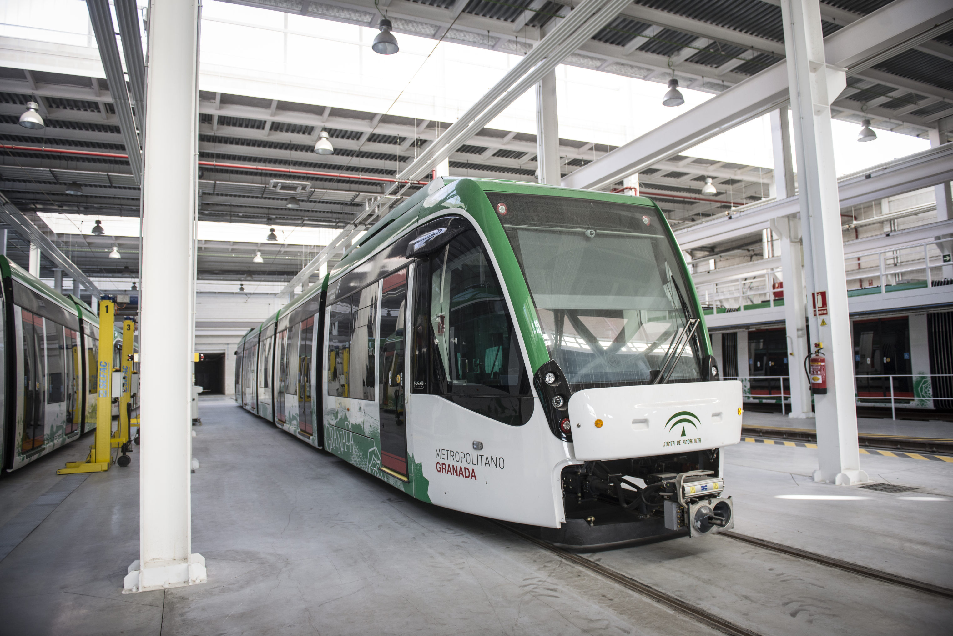 Metropolitano de Granada